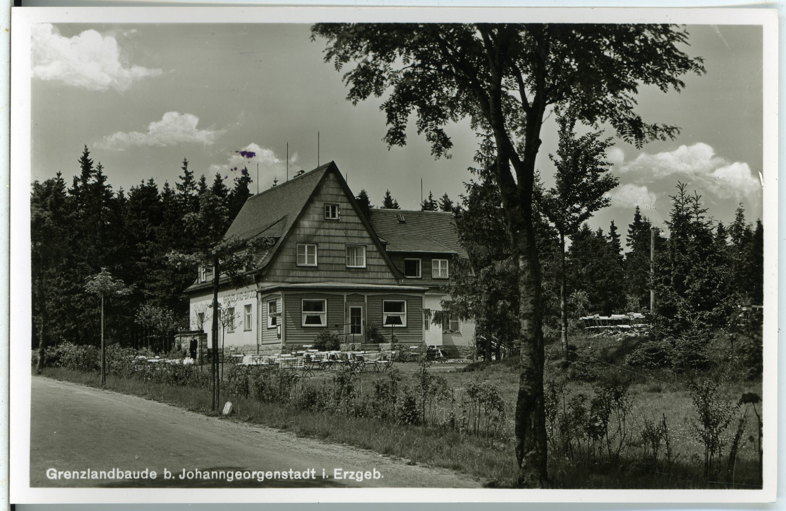 Johanngeorgenstadt; Grenzlandbaude This postcard is from publisher Brück & Sohn in Meißen ( postcard has a unique number 27033 and is available in a higher resolution at the publisher. This images was uploaded in a cooperation project between Wikipedians and the publisher.